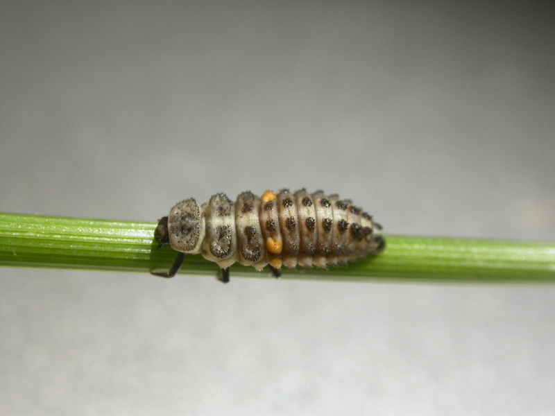 Aphidecta obiterata